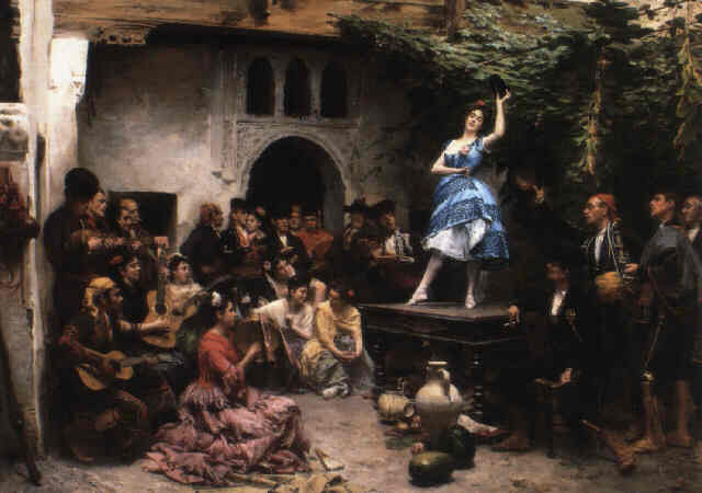 Óleo sobre lienzo 58.4 x 81.3 cm del pintor Jules Worms (1832- 1894) titulado La danda del Vito en Granada